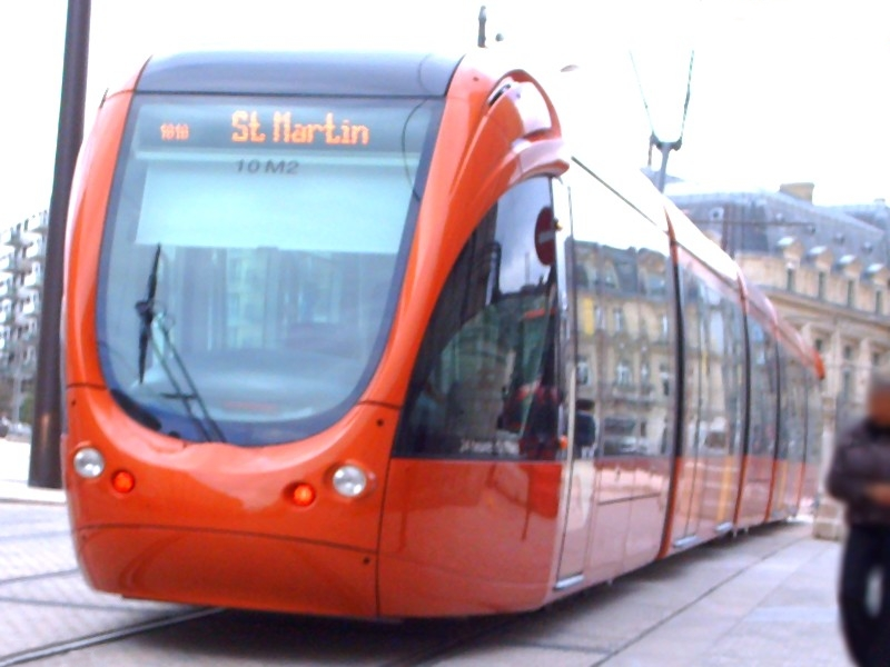 Le Tram au mans (tests)